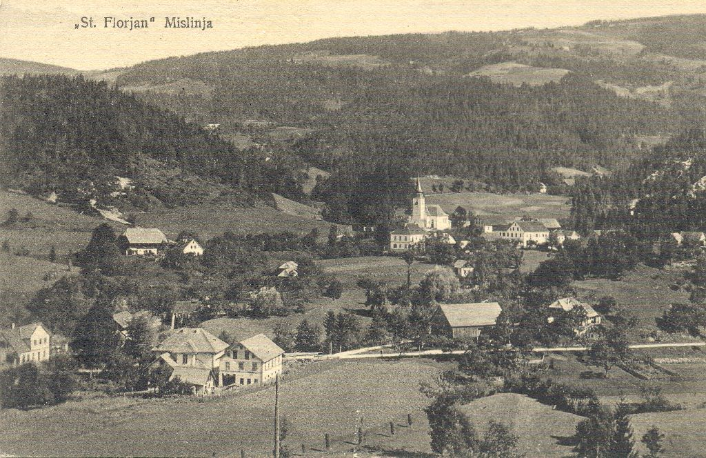 Razglednica Srednjega Doliča.